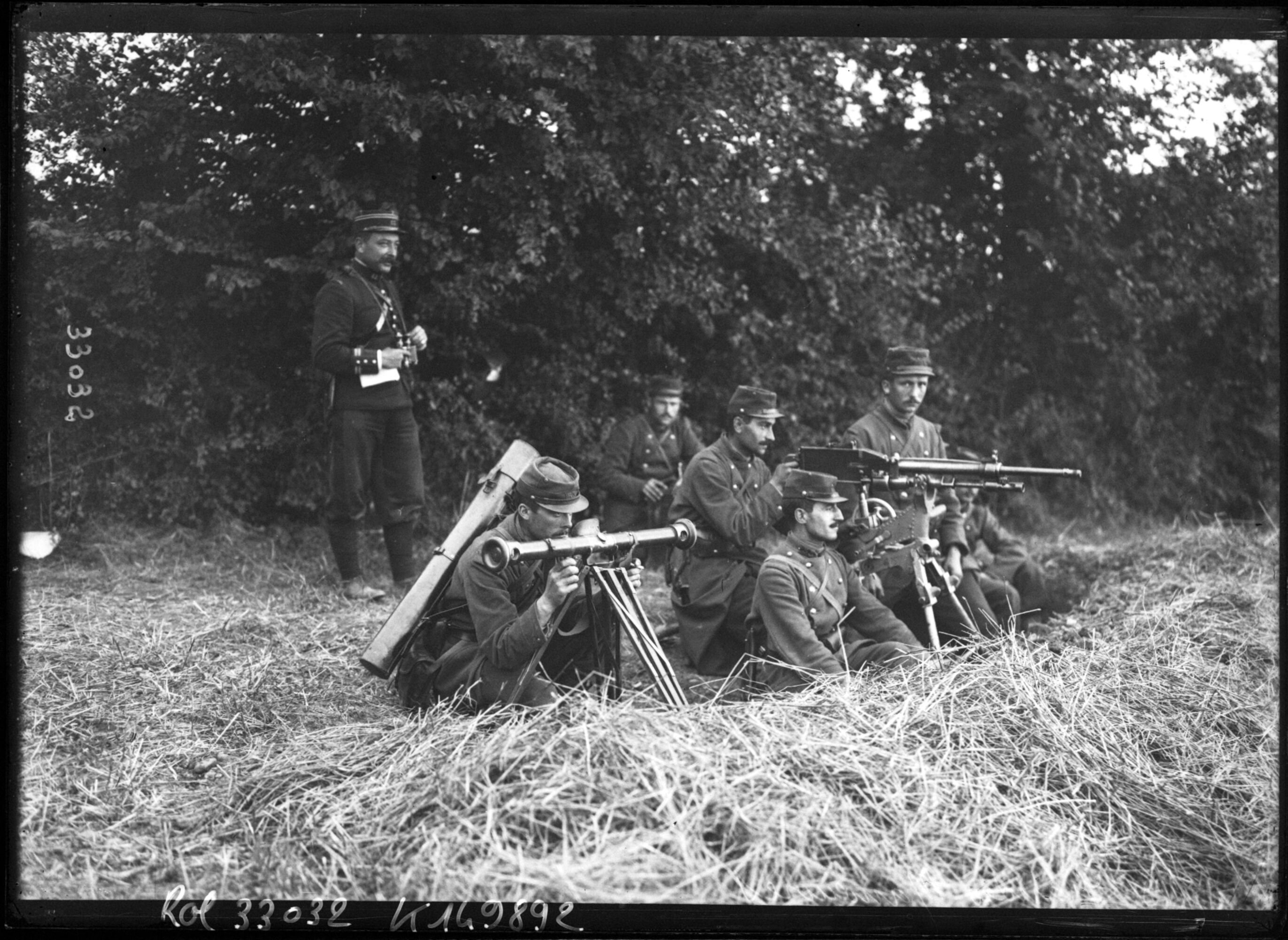 Une mitrailleuse mise en batterie par des fantassins lors des grandes manœuvres de l'armée française en 1913.